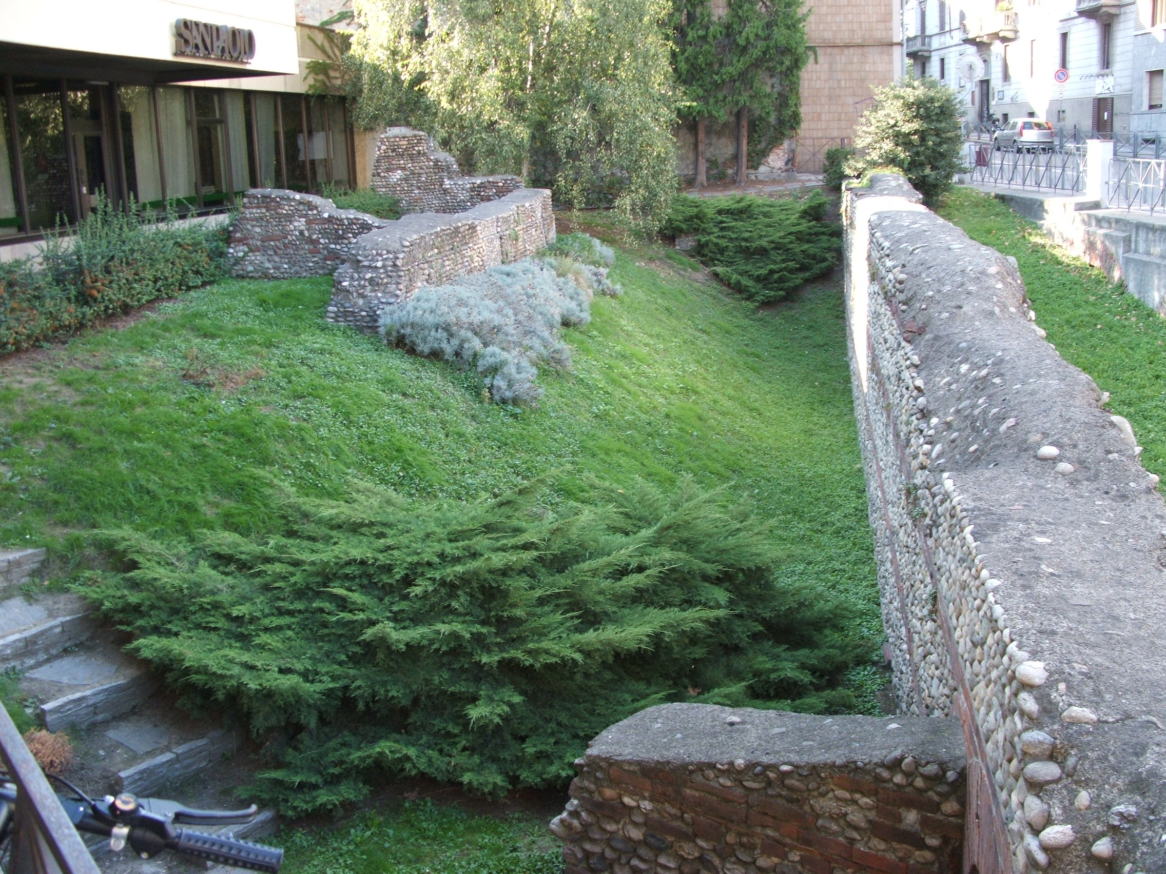 Resti delle mura romane in Piazza Cavour a Novara, Piemonte, Italia